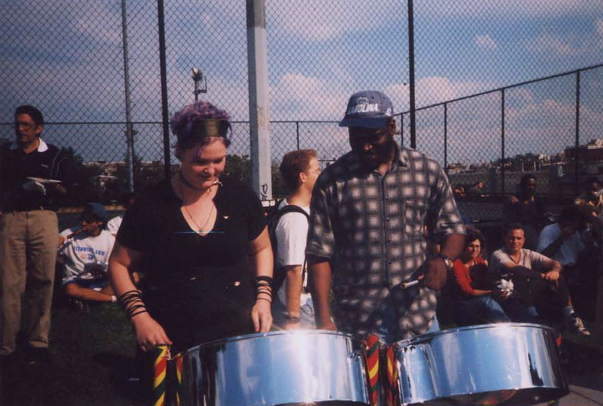 A woman playing steel drums.